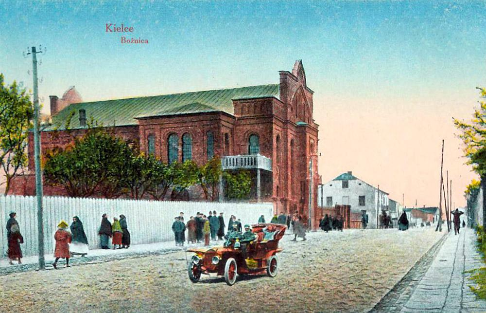 Synagoga w Kielcach, obecnie w budynku znajduje się Archiwum Państwowe